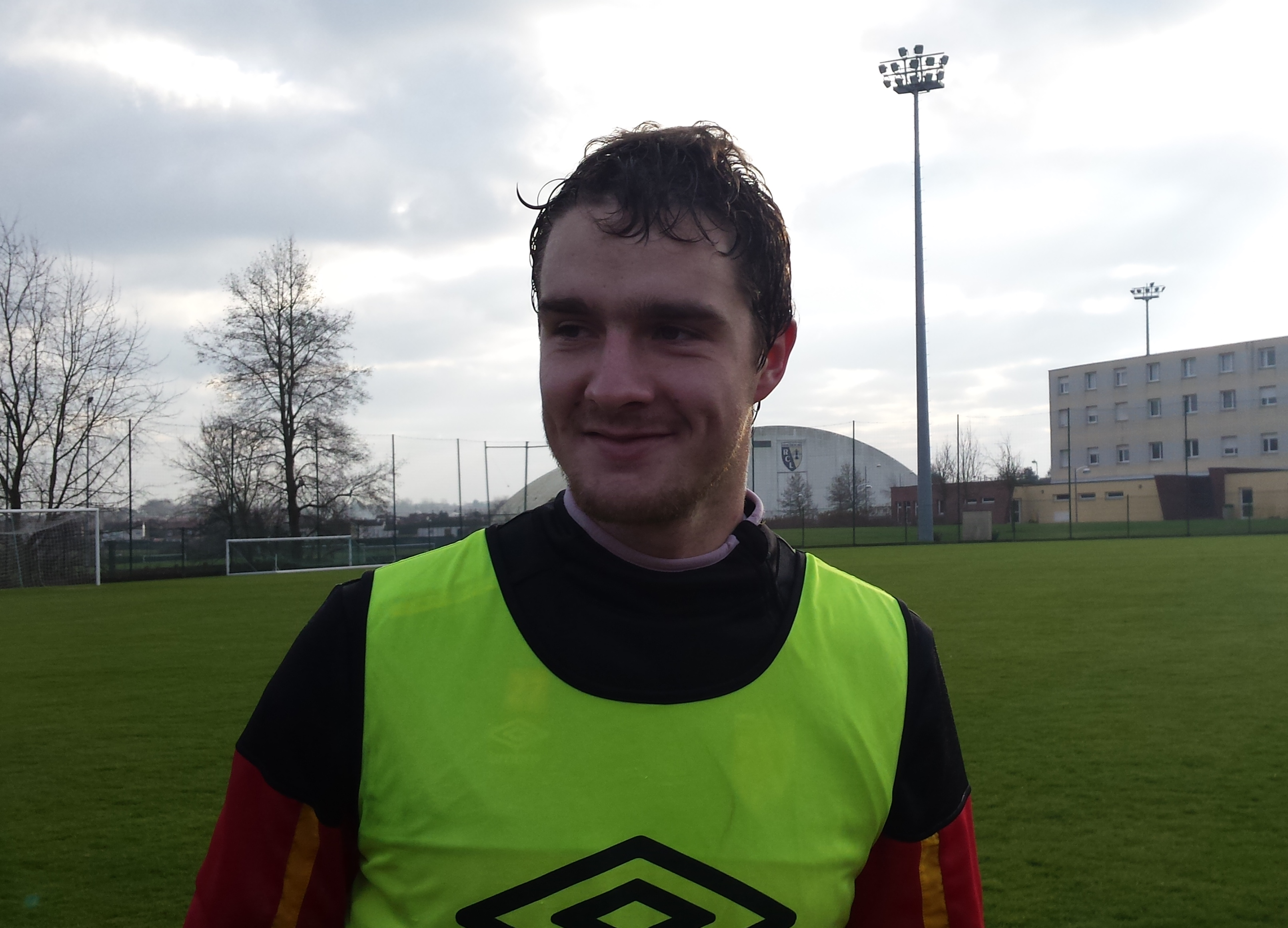 Benjamin Boulenger après un entraînement public du Racing Club de Lens, le 31 décembre 2014, sur le terrain "San Siro" du Centre Technique et Sportif de La Gaillette